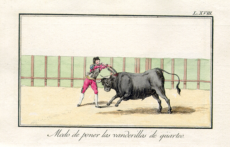 Delgado y Gálvez, José: Tauromaquia o arte de torear á caballo y á pie